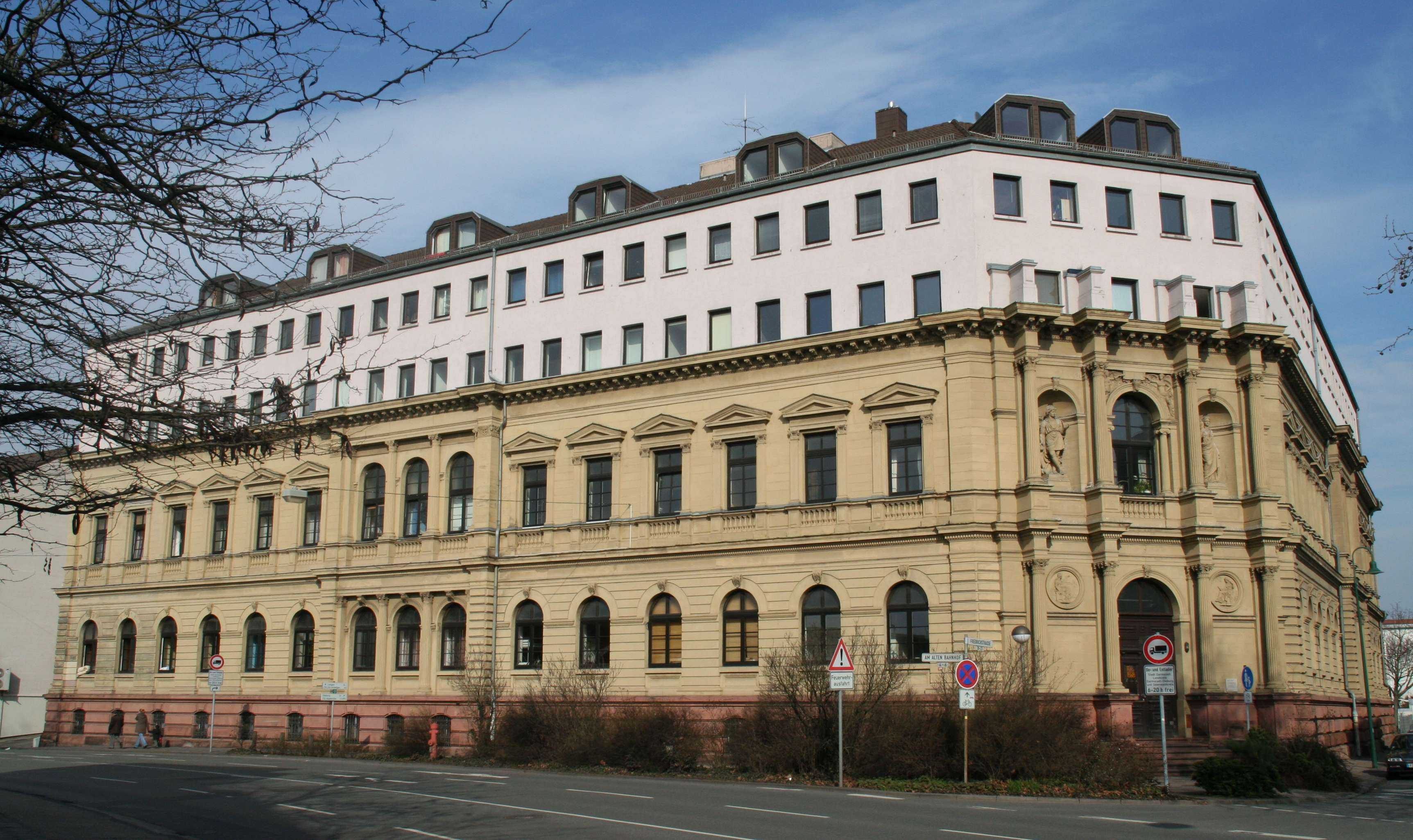 Ehemaliges Gebäude der Bank für Handel und Industrie, Am Alten Bahnhof 6 in Darmstadt